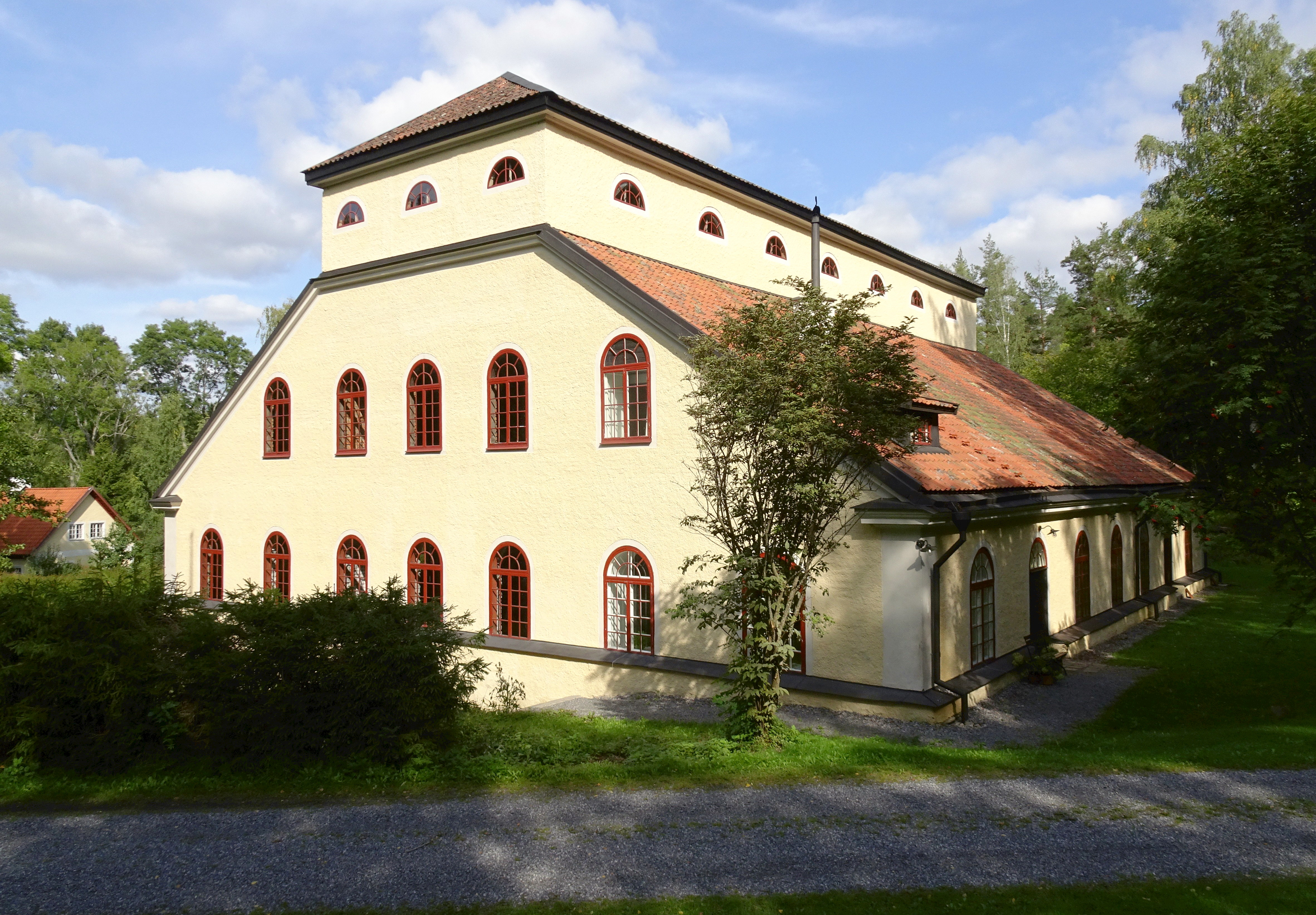 Björndammens masugn